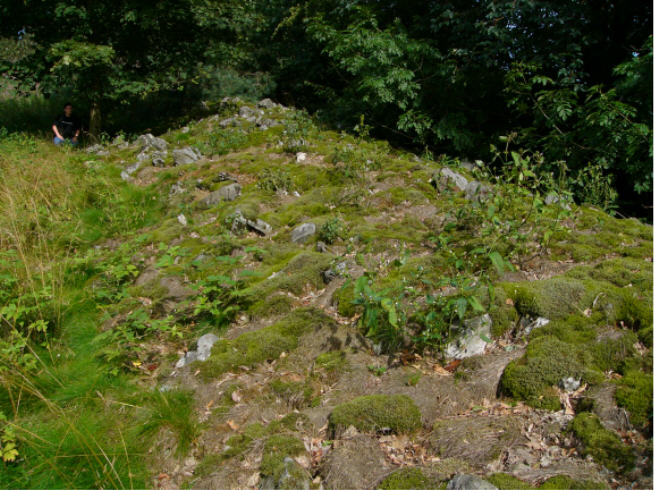 Das abgebildete Teilstück der ehemaligen Befestigungsanlage ist am Fuße der Milseburg zu finden, unterhalb der Ausgrabungsstätte.